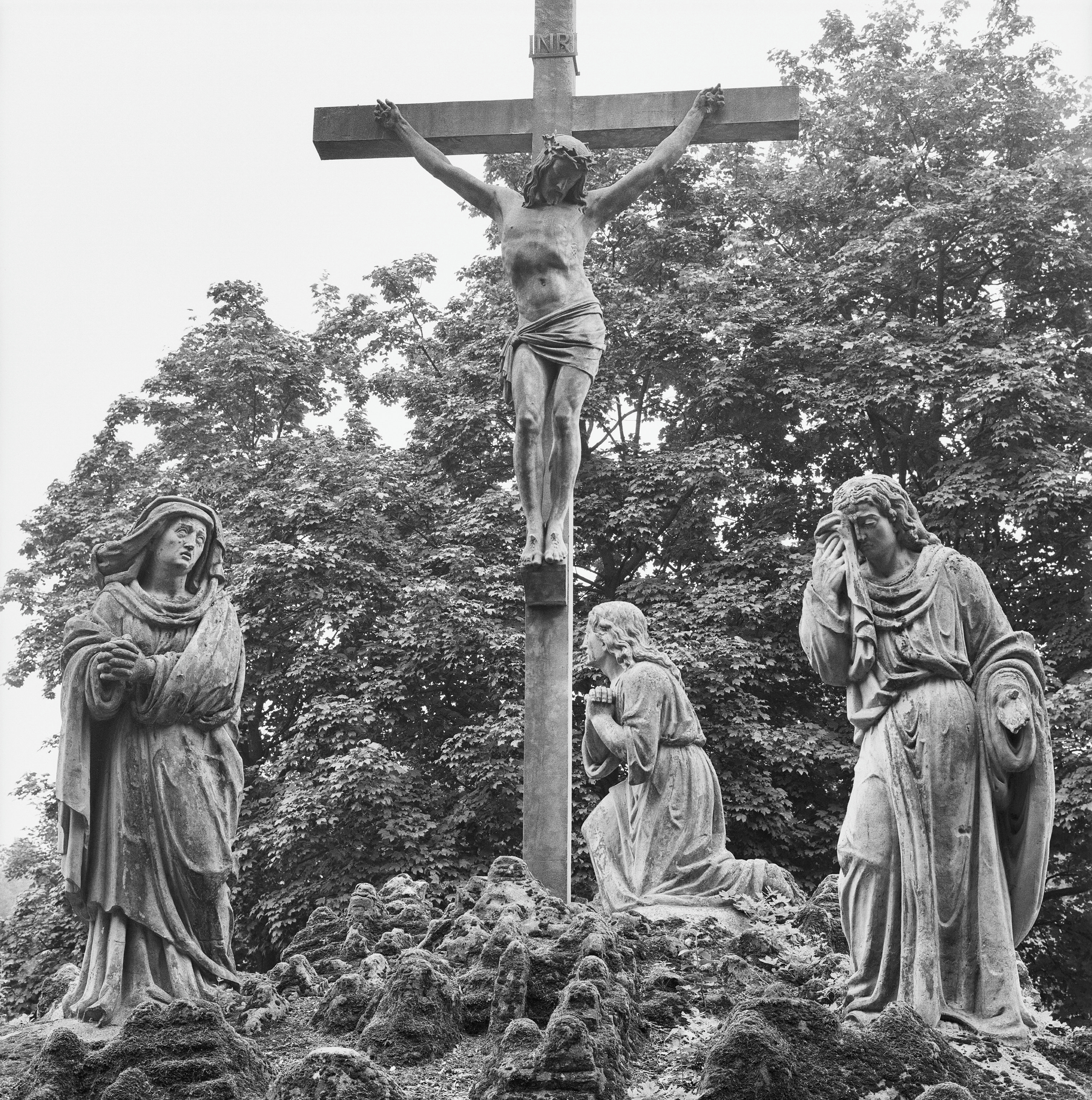 Begraafplaats: Exterieur BEELDENGROEP (CALVARIE BERG)